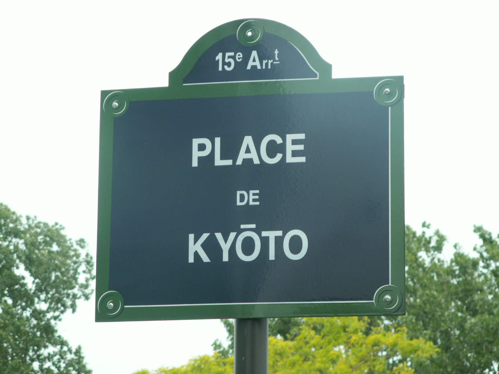 Plaque de la place de Kyoto à Paris, 15e Kyoto plazza street sign in Paris, 15e